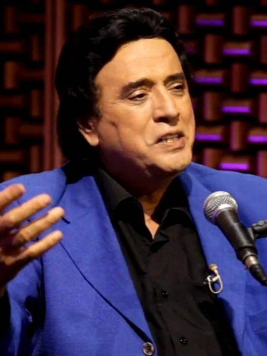 Akustikhane programında Erol Büyükburç Bir Başka Sevgiliyi Sevemem'i seslendirirken